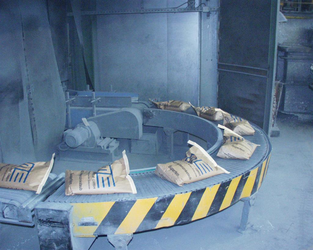 Verpackung von Zinkoxid in Säcken bei der Norzinco